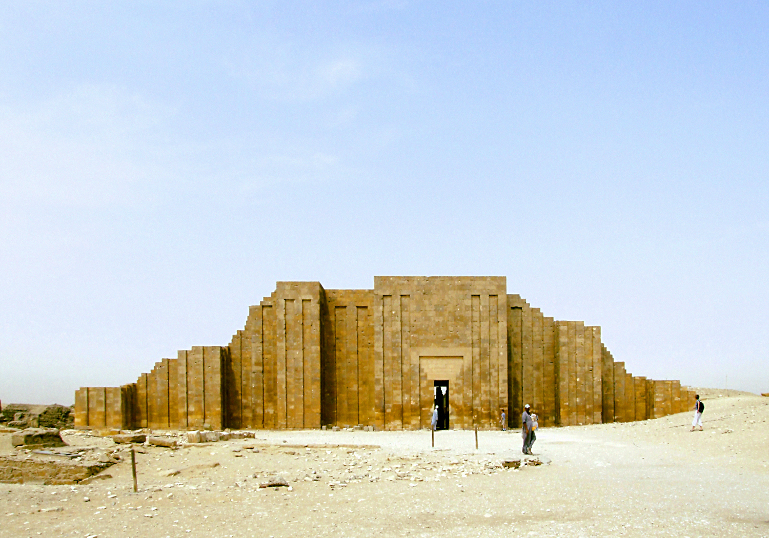 Nekropolia w Sakkarze (Memfis), wejście do zespołu piramidy schodkowej. [Memphis nekropolis, Step Pyramid of Djoser, entrace